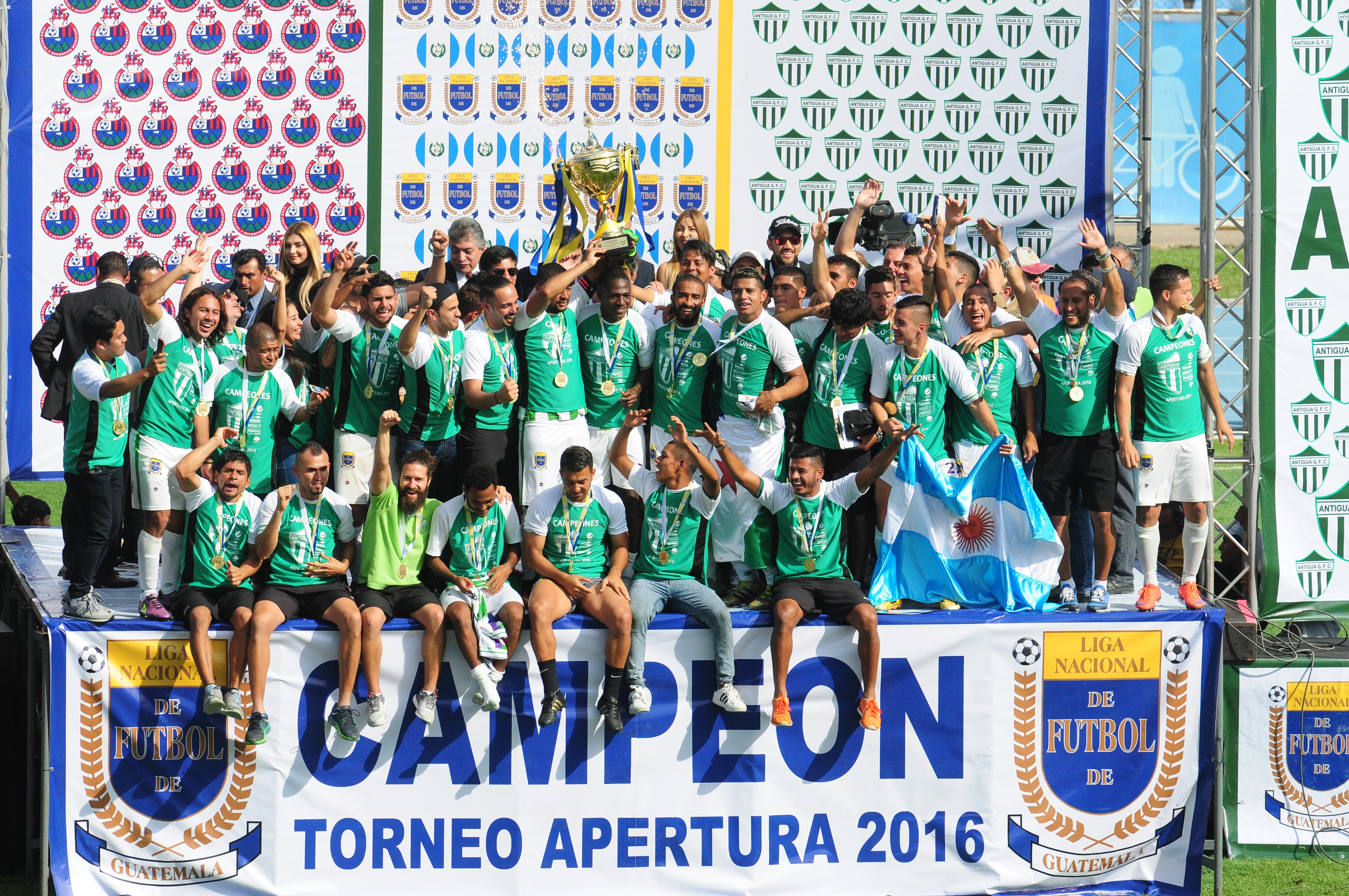 Antigua GFC celebró el campeonato en el Estadio Nacional Doroteo Guamuch Flores.